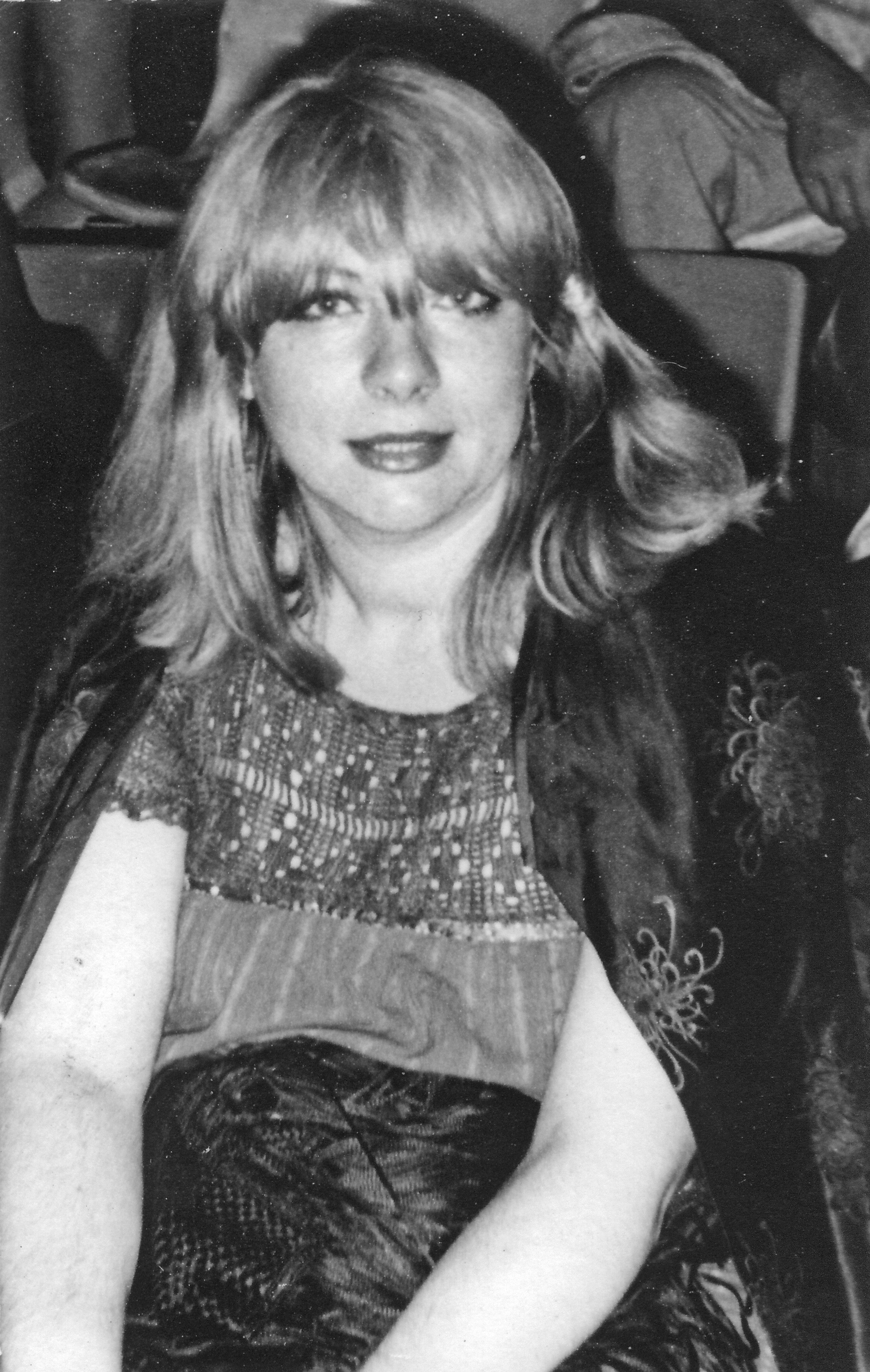 na Filmskim susretima u Nišu 1984. godine